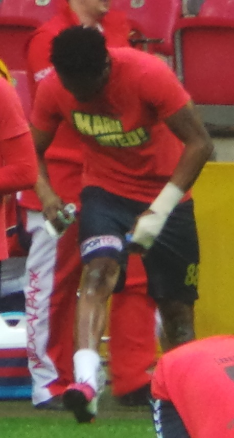 Raheem Lawal at GS match